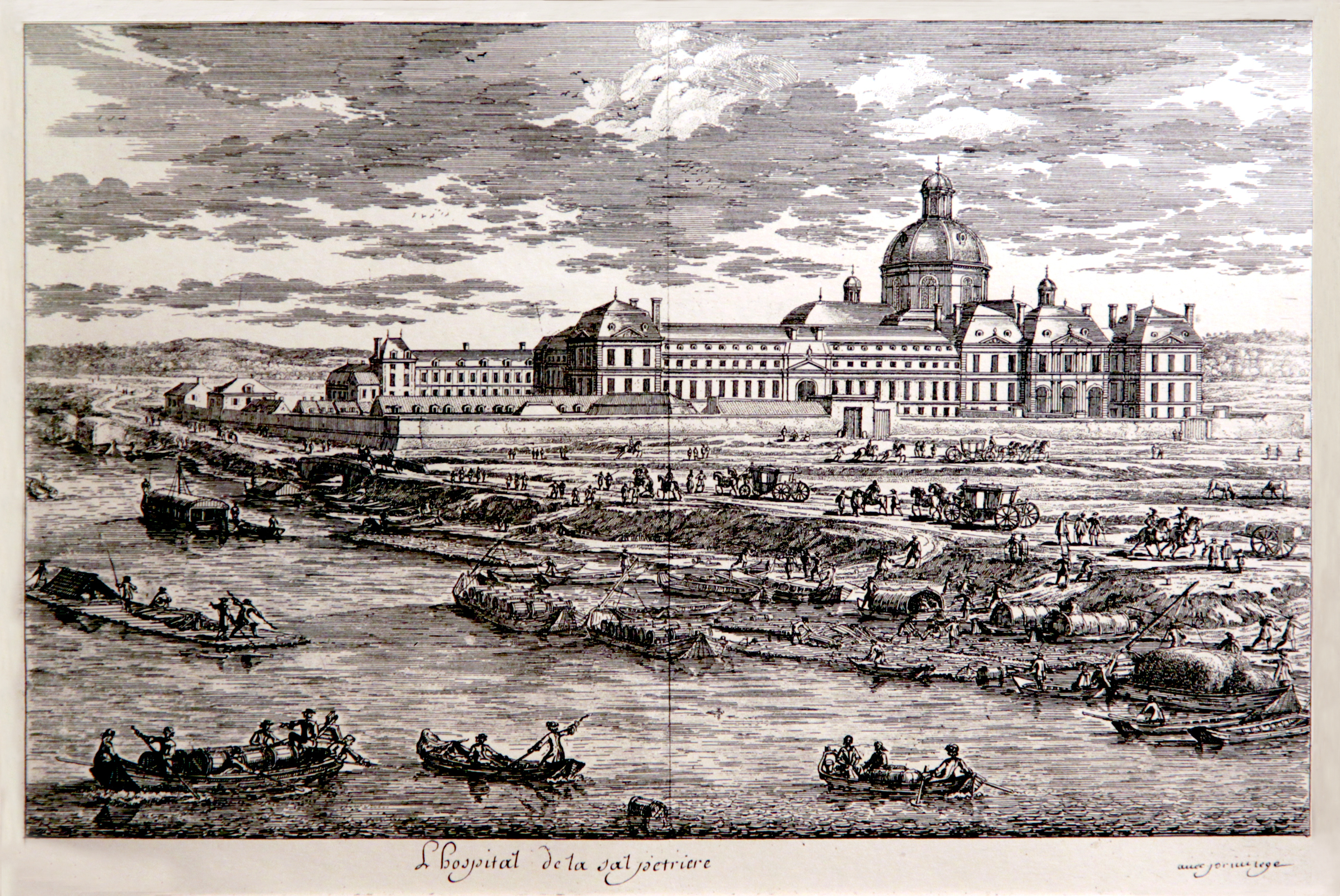 Gravure réalisée vers 1660 par Adam Pérelle représentant " L'Hospital de la Salpestriere hors la Porte St. Bernart ", appartenant aux collections du château de Vaux-le-Vicomte - Maincy (Seine-et-Marne, France).